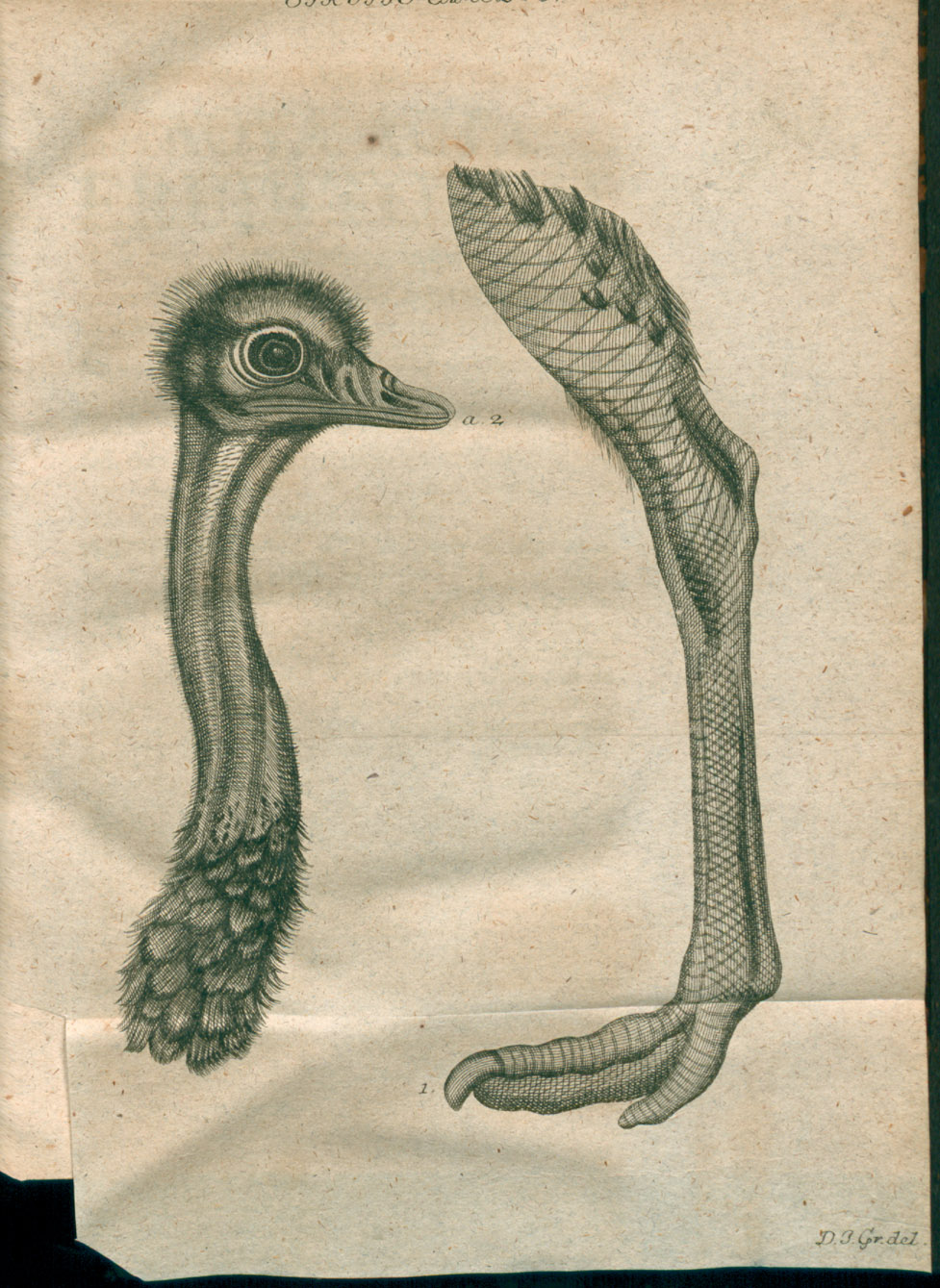 Illustration